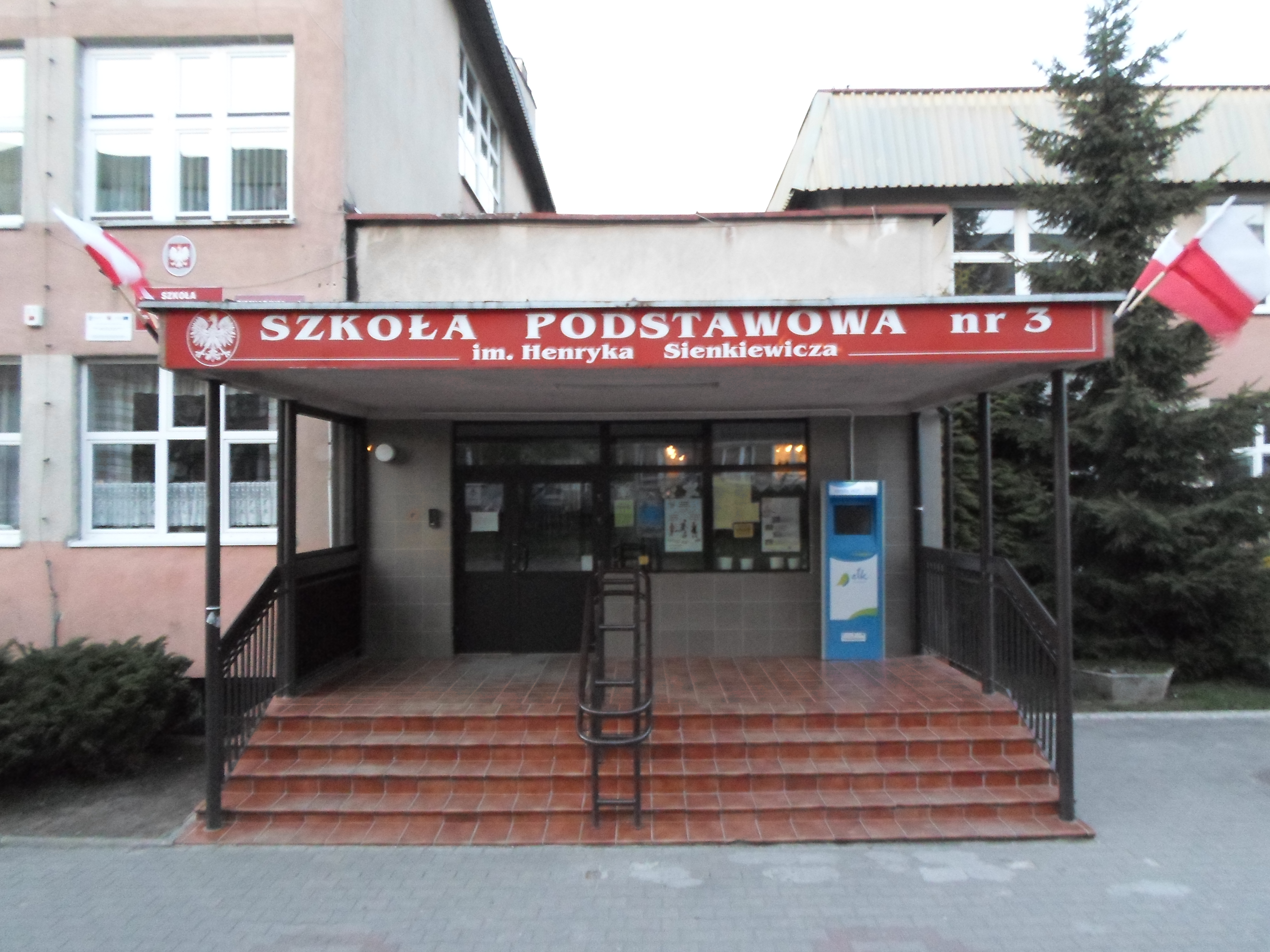 Główne wejście do Szkoły Podstawowej nr 3 im. Henryka Sienkiewicza w Ełku, stan na maj 2013